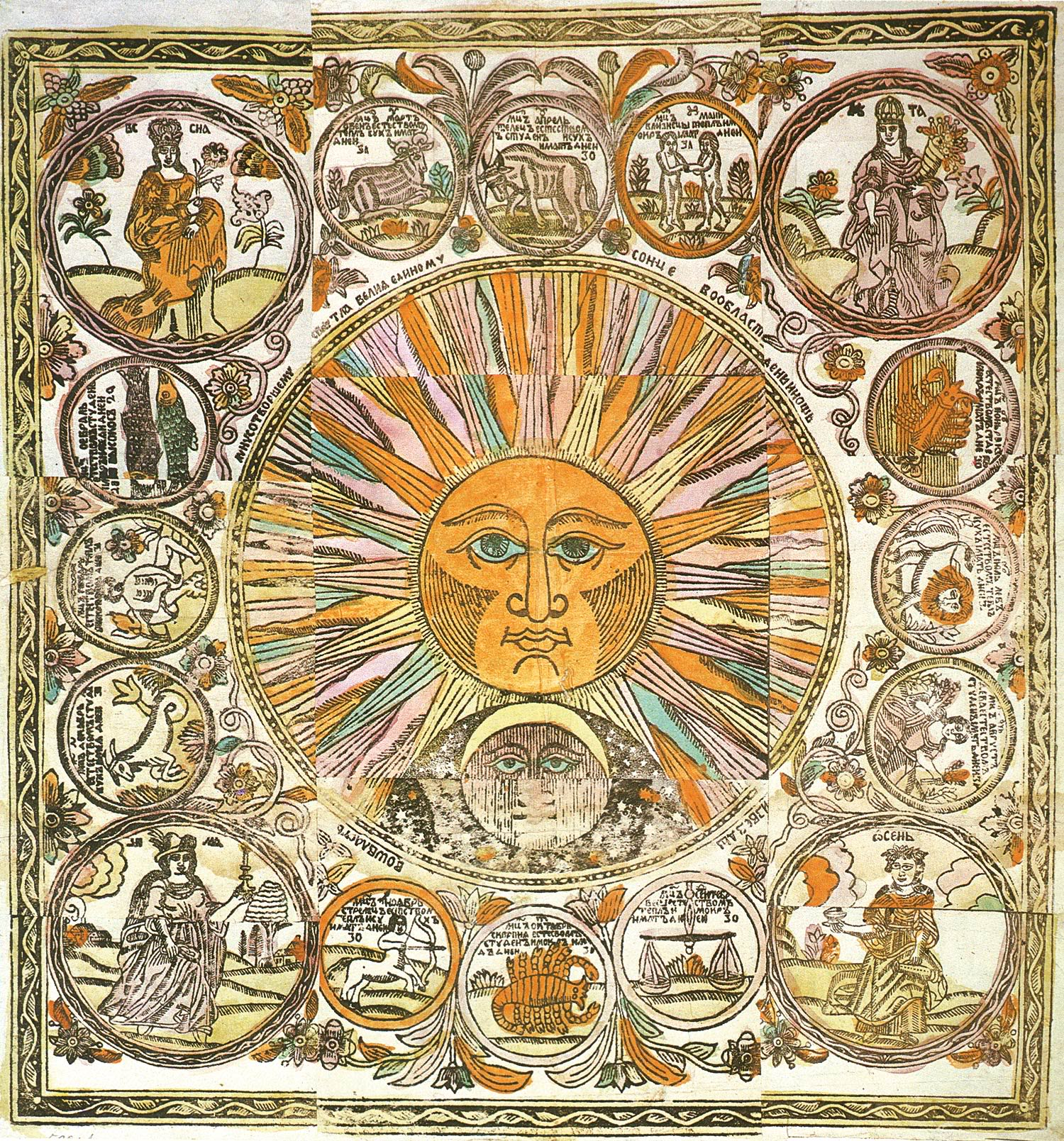 Солнце, Луна, времена года и двенадцать месяцев в виде знаков Зодиака. Лубок. Конец XVII -начало XVIII в.